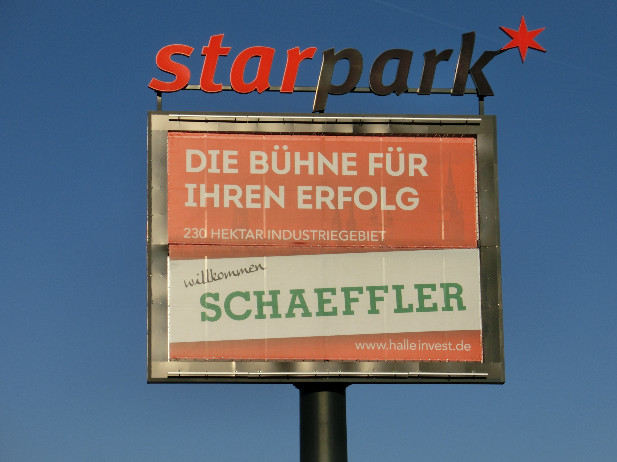 Industriegebiet Halle-Saalkreis an der A14 - Star Park Großer Werbeaufsteller an der Orionstraße der von der Bundesautobahn 14 gut sichtbar ist und den neuen Investor Schaeffler begrüßt.